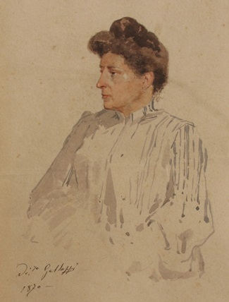 Ritratto della madre Teresa Aveta, acquerello